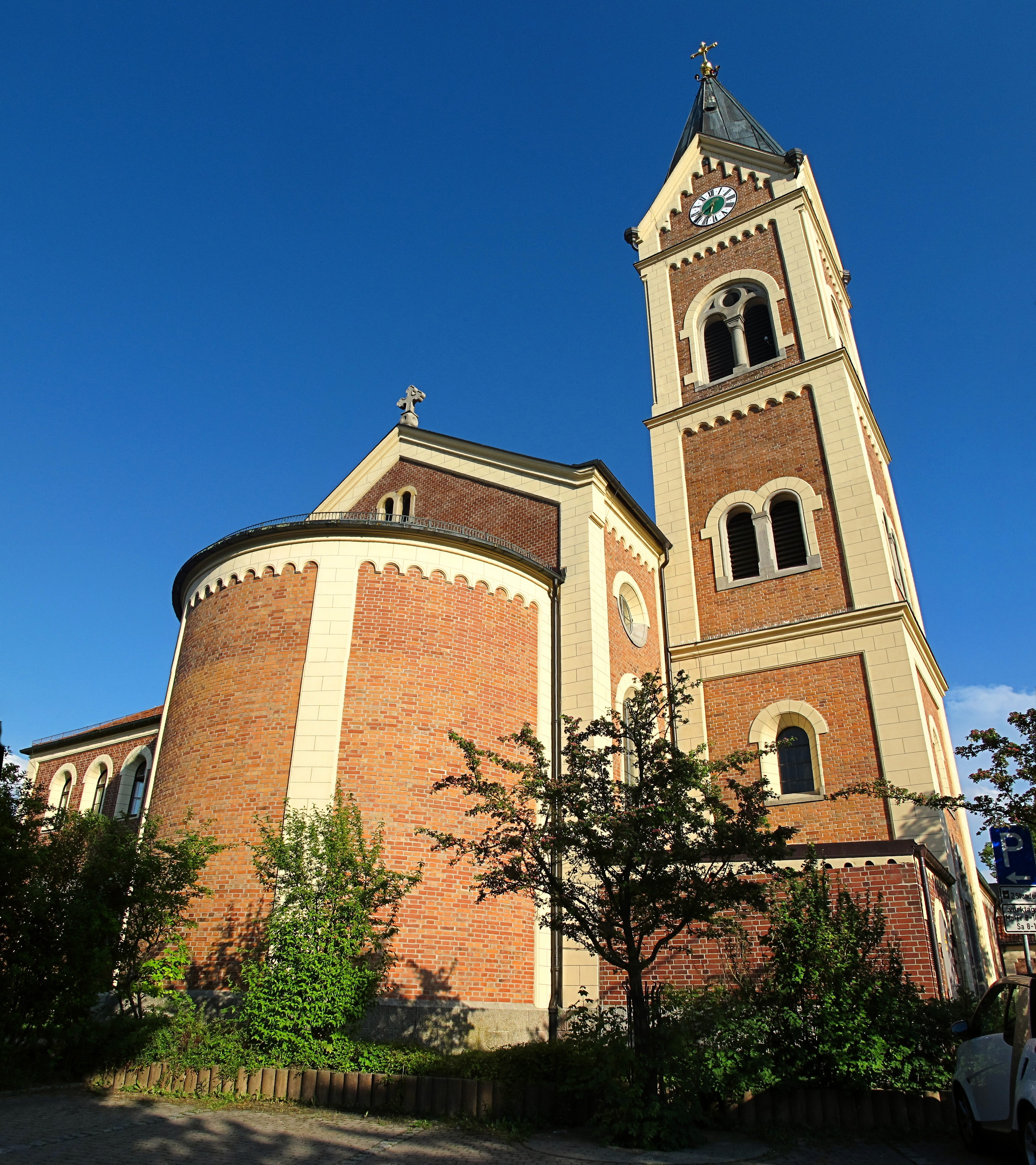 Deutschland, Bayern, Landkreis Fürstenfeldbruck, Gemeinde Olching, Pfarrkirche St. Peter und Paul, Rückseite, Hochpanorama